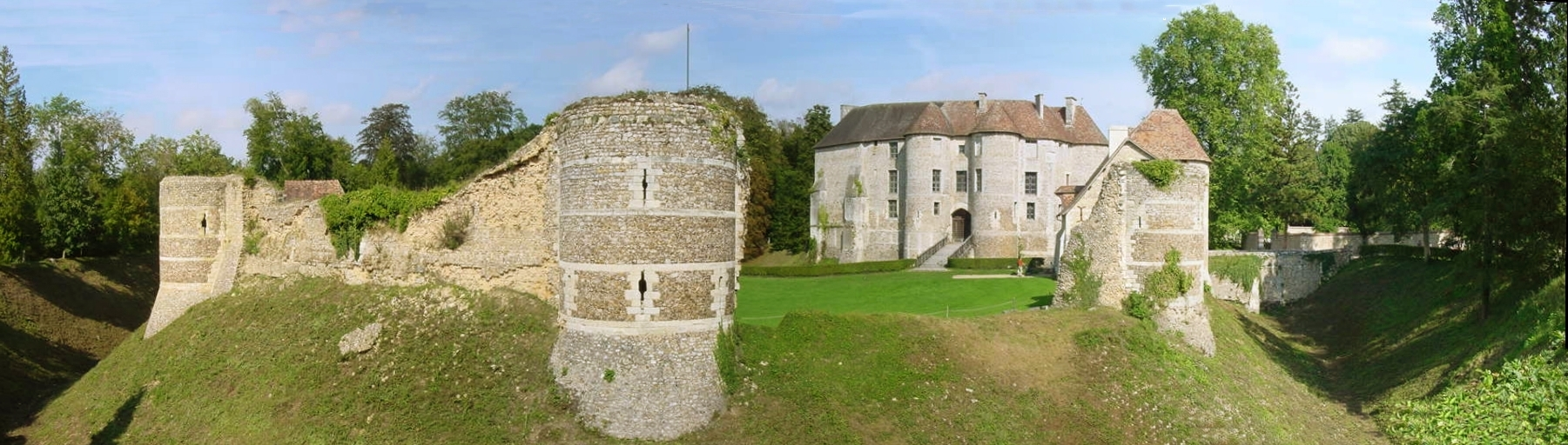 Le château d'Harcourt (XIIe-XIVe siècle) avec la basse-cour au premier plan et le logis au fond.